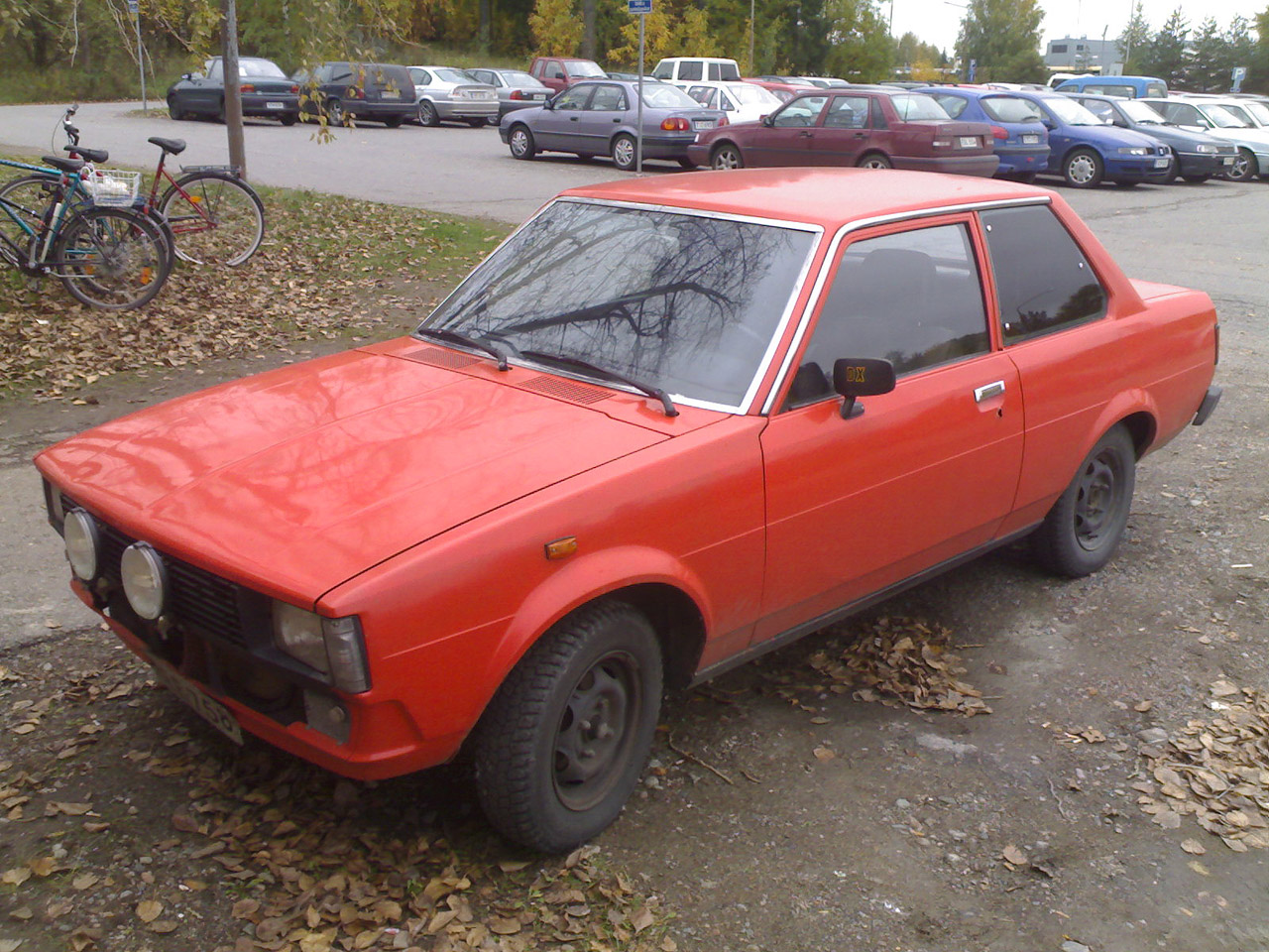 Toyota Corolla Dx (1980-81)